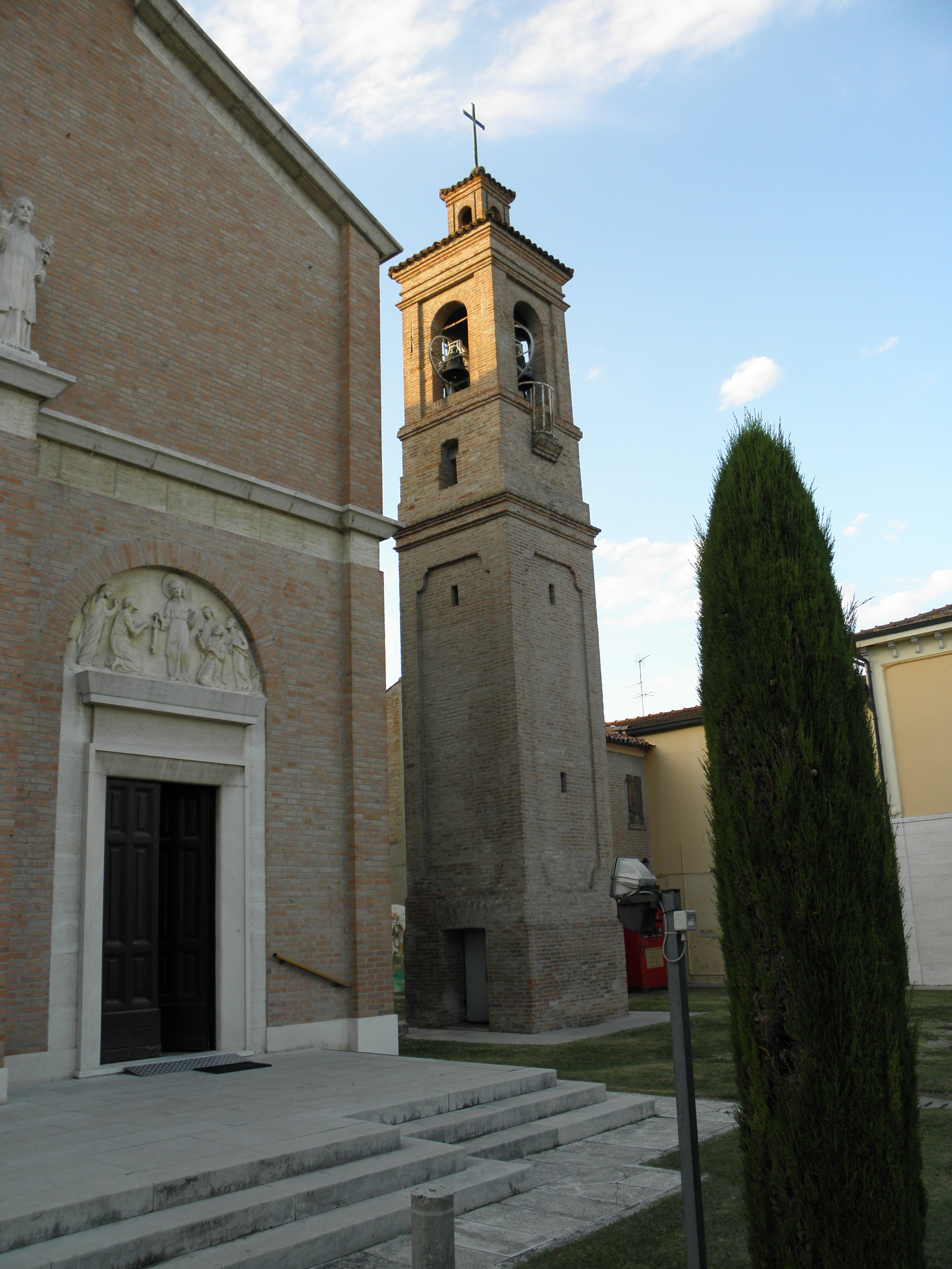 San Bartolomeo in Bosco, frazione di Ferrara: il campanile del XIX secolo accanto alla chiesa parrocchiale di San Bartolomeo Apostolo.